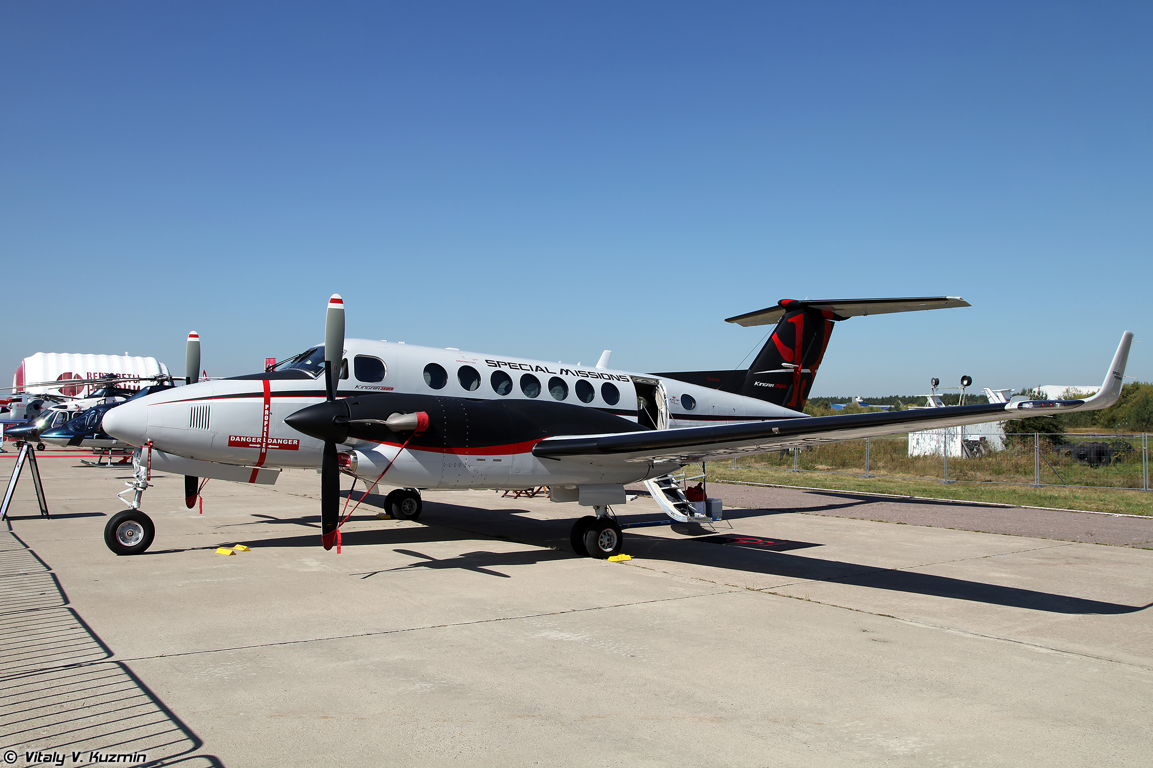 Beechcraft King Air 350ER